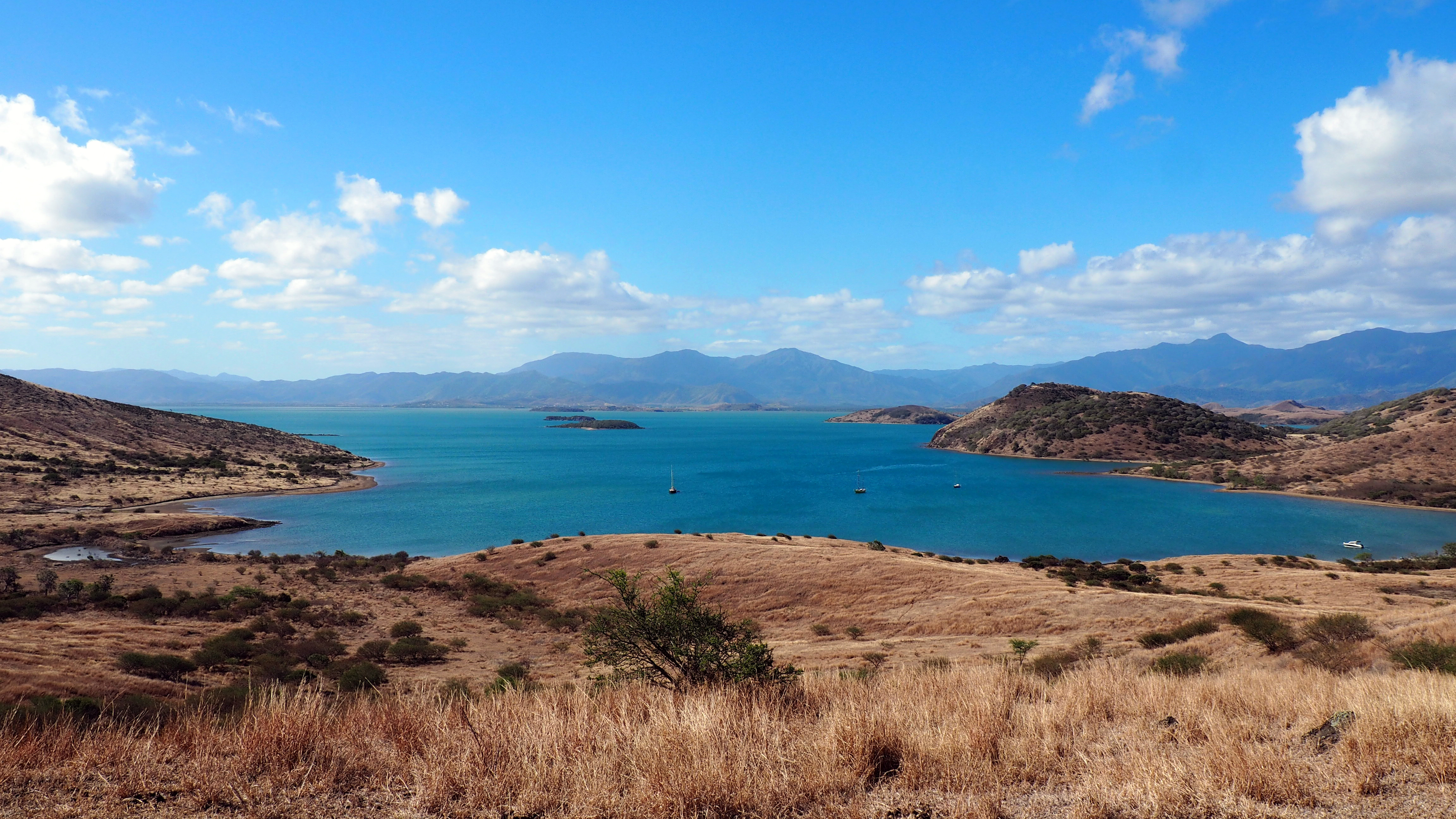 St Vincent